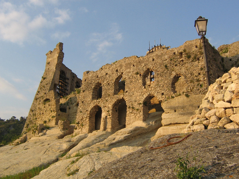 Cleto, Castello Normanno o di Petramala.